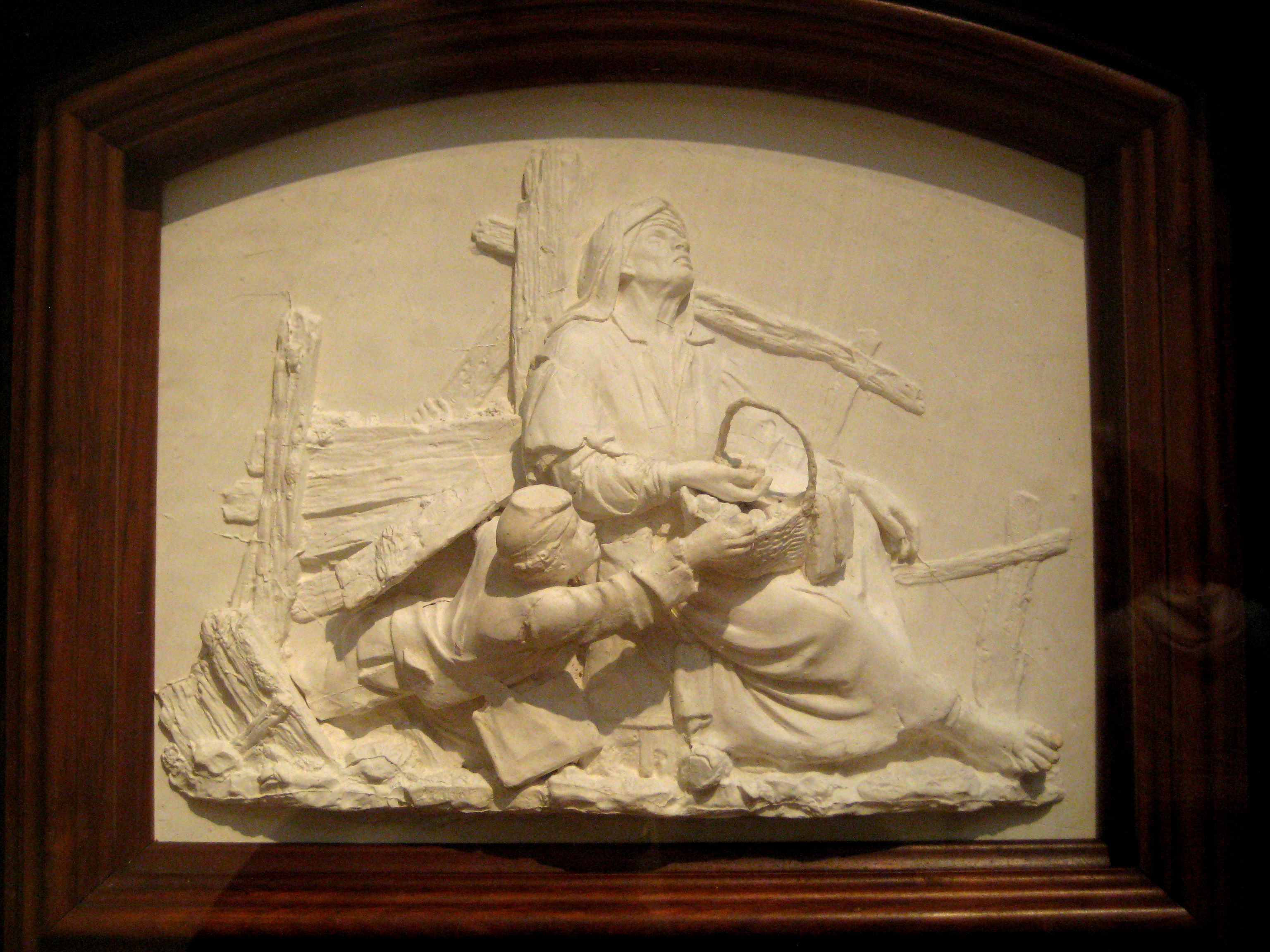 "Мальчик, крадущий яблоки", 1866. Гипс. Марк Антокольский